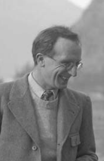 Edgardo Baldi - Istituto per lo studio degli ecosistemi Verbania